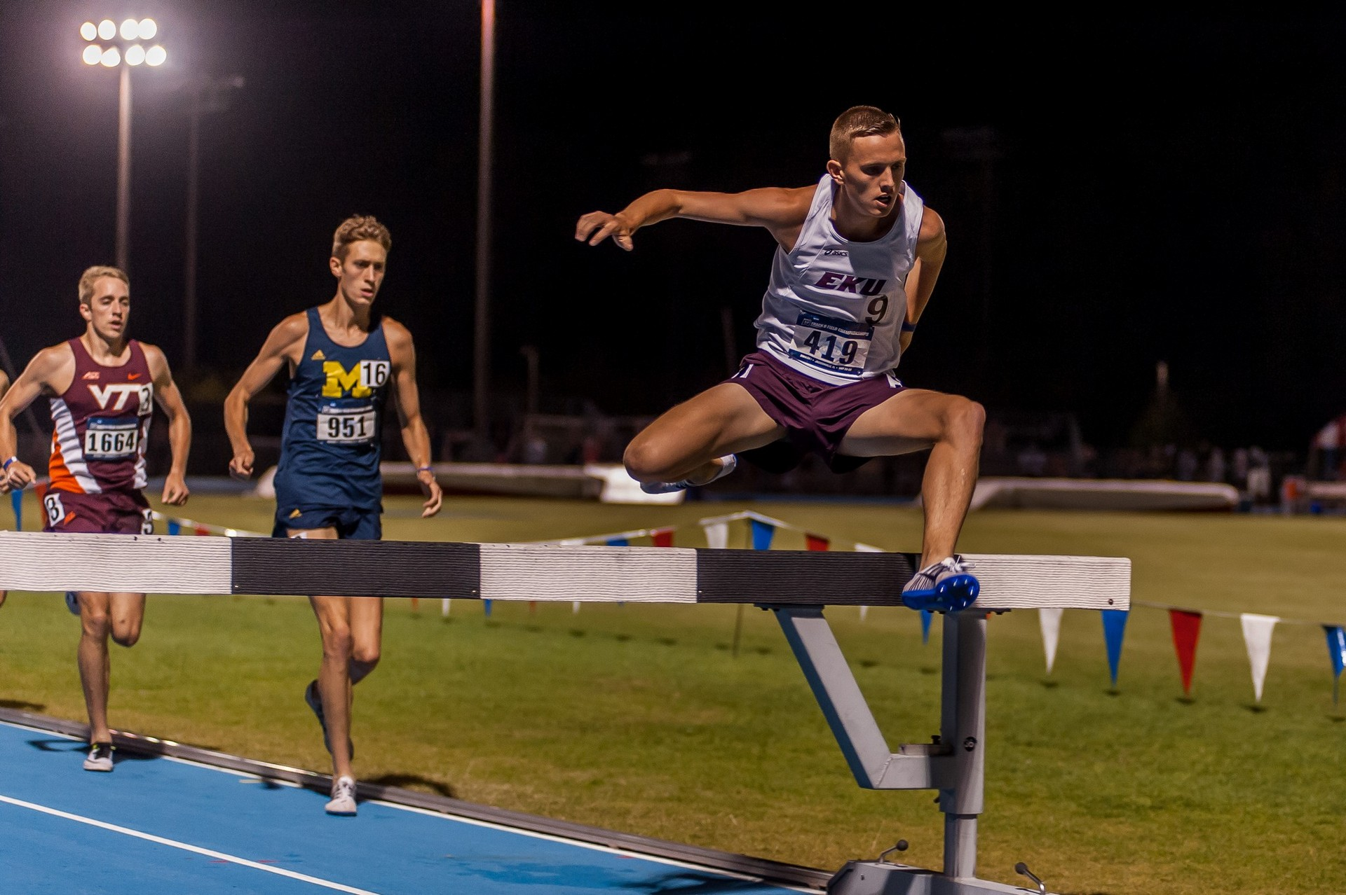 Jakob Dybdal Abrahamsen ved Regionals 2016 hvor han løber sin personlige rekord og kvalificere sig til NCAA